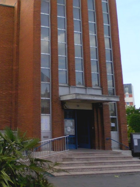 La mairie du Bourget